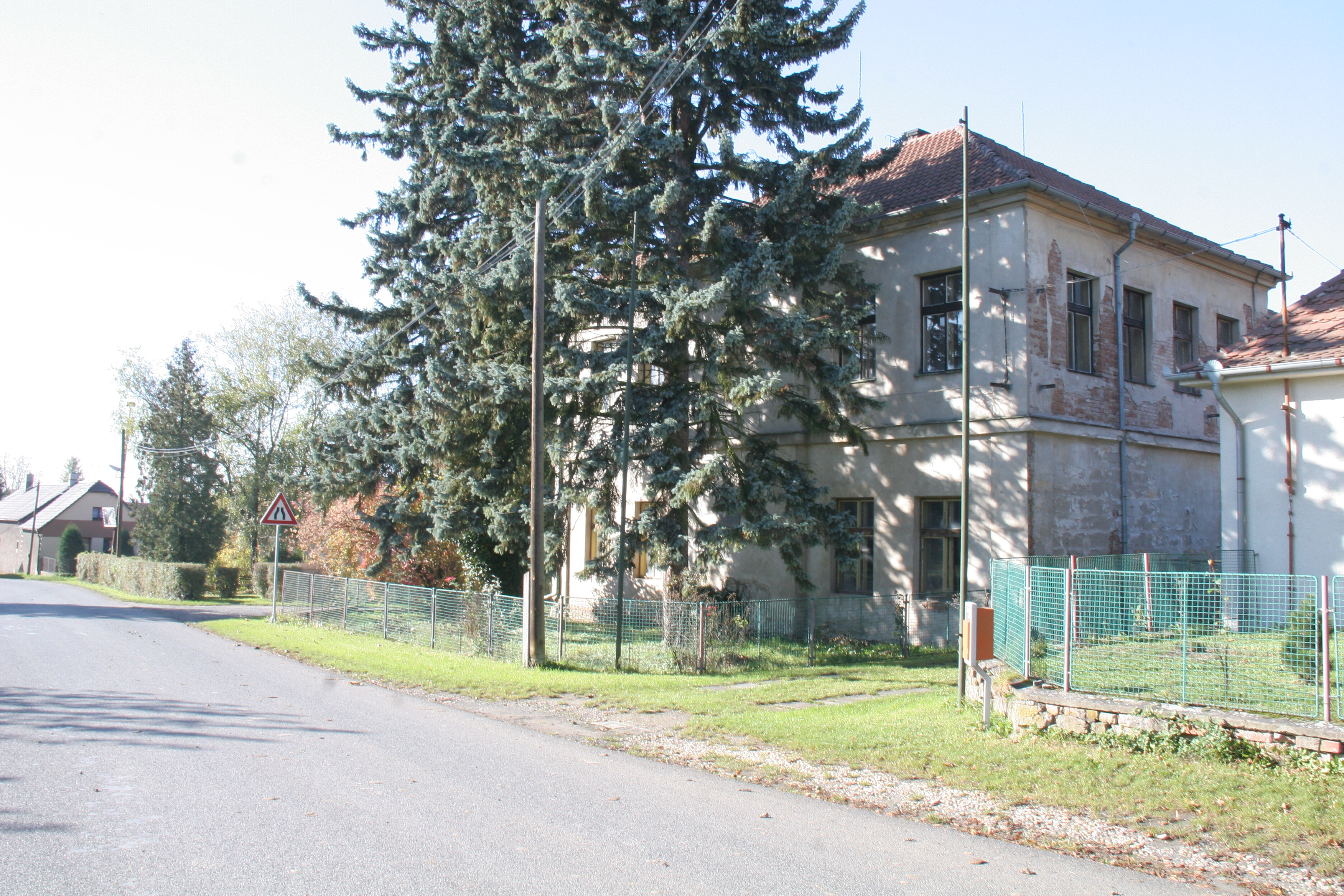 Vinaře bývalá škola